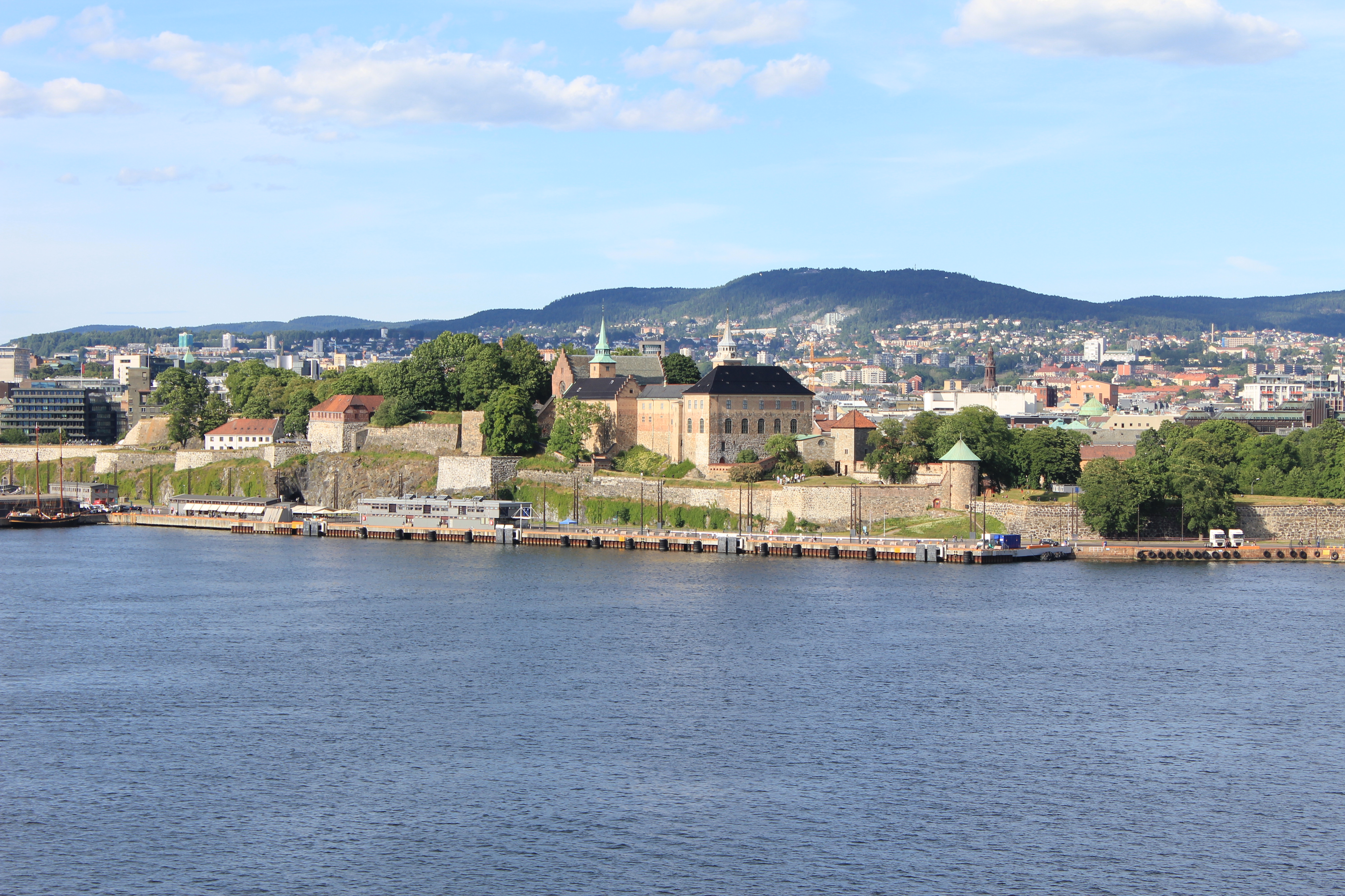 Akershus festning sett fra fjorden